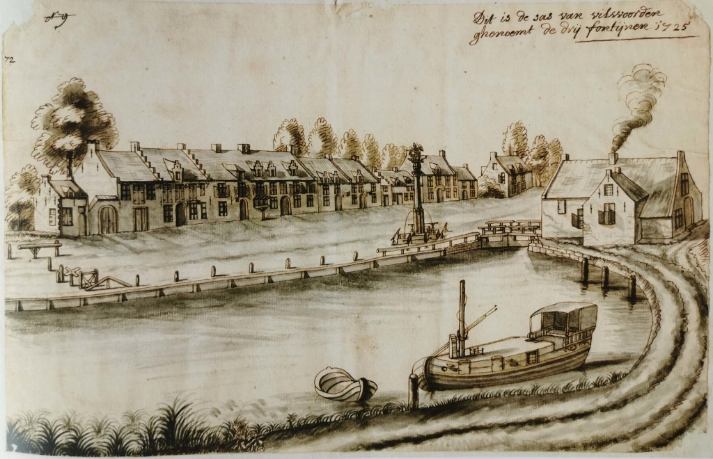 Derons, De sluis van Drie Fonteinen, 1725 (Museum NBB)